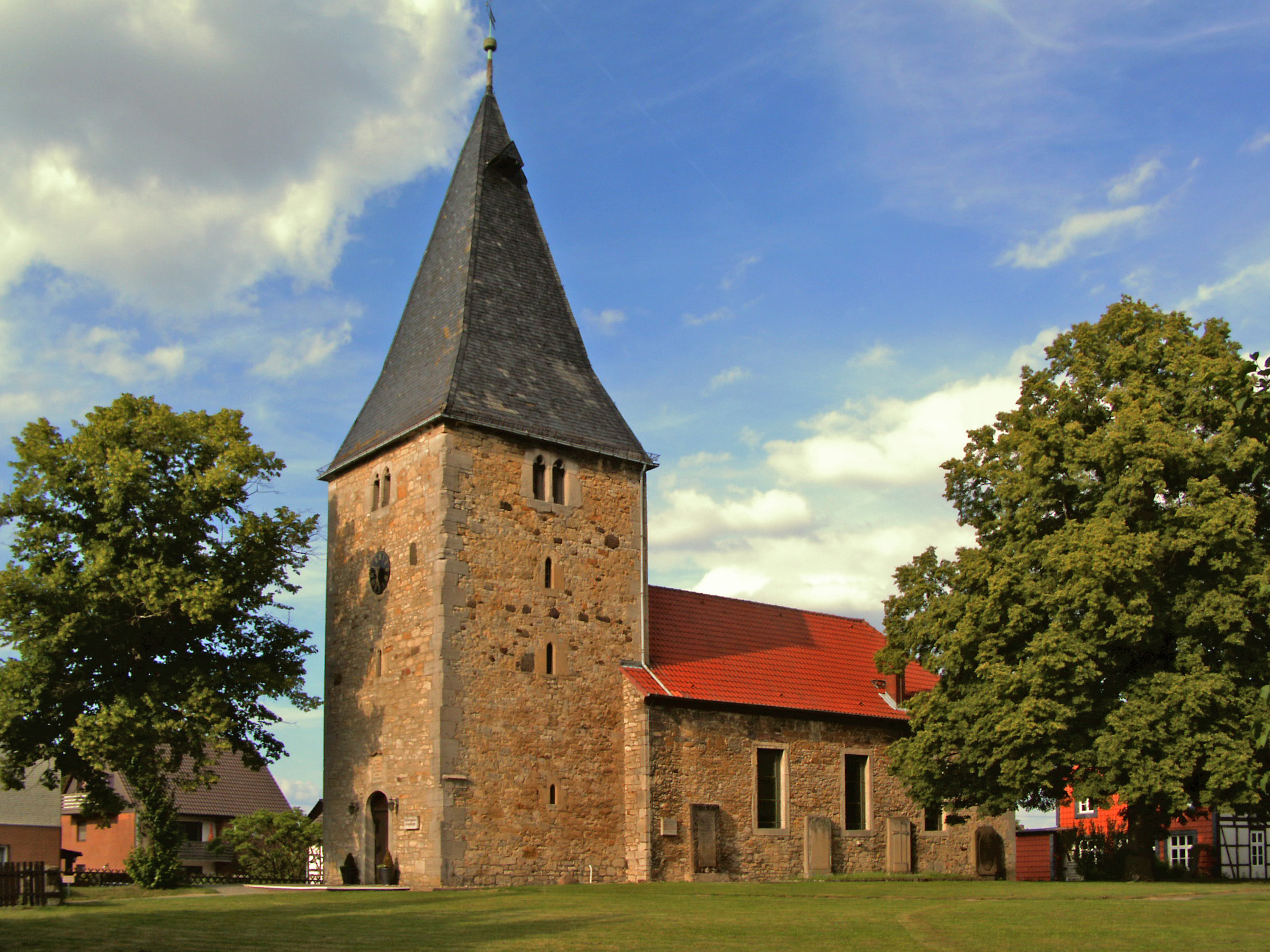 Evangelisch-lutherische Kirche Sankt Dionysius Areopagita in Wendhausen, Ortsteil von Lehre